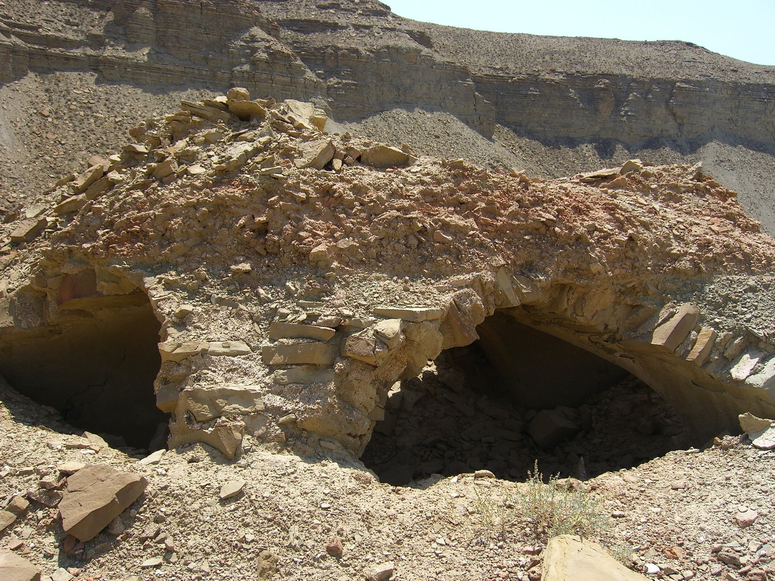 Xarabagilan - şəhər-arxeoloji abidə. antik dövr